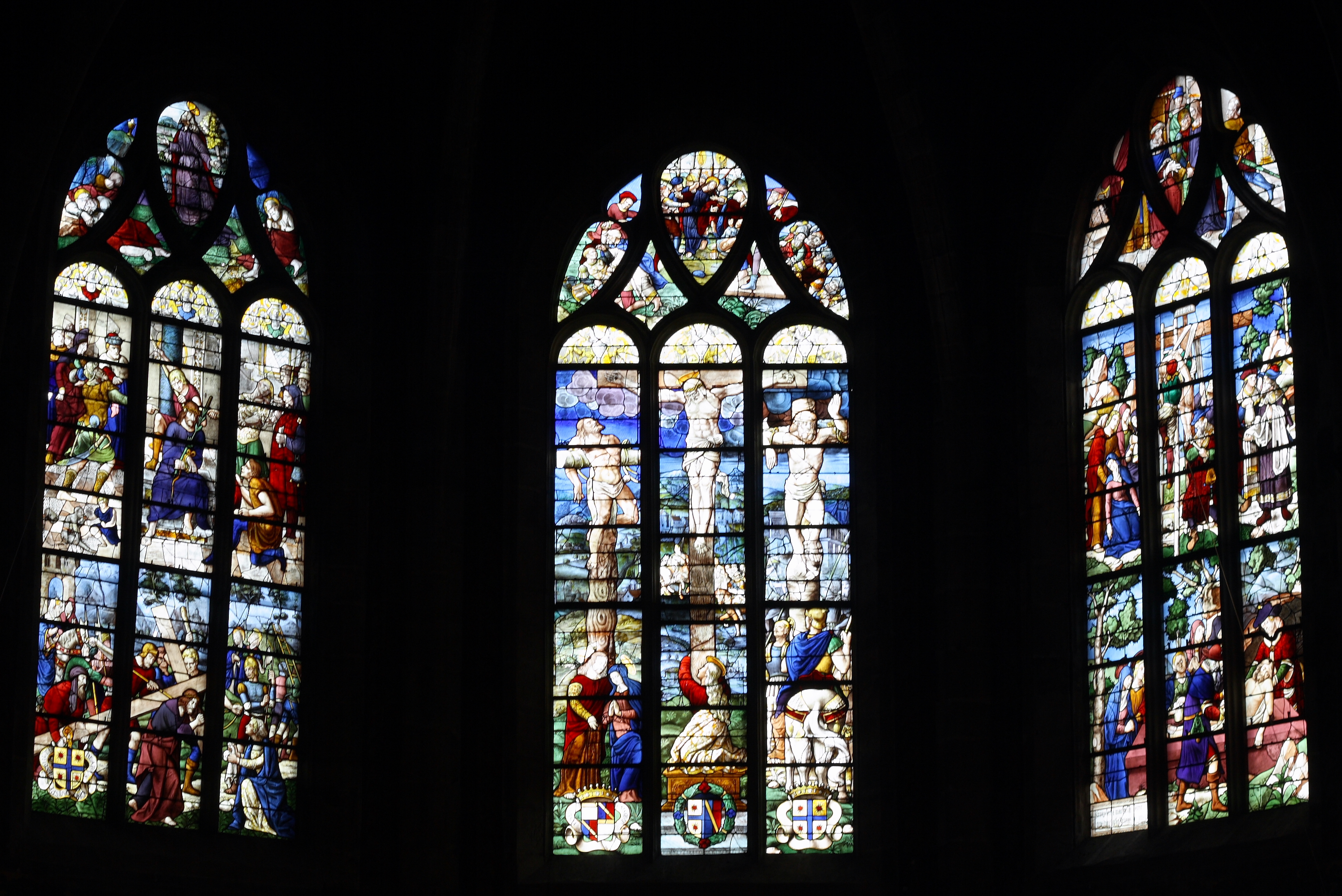 Katholische Pfarrkirche Saint-Pierre in Limours, einer Gemeinde im Département Essonne (Île de France), Chorfenster, um 1520